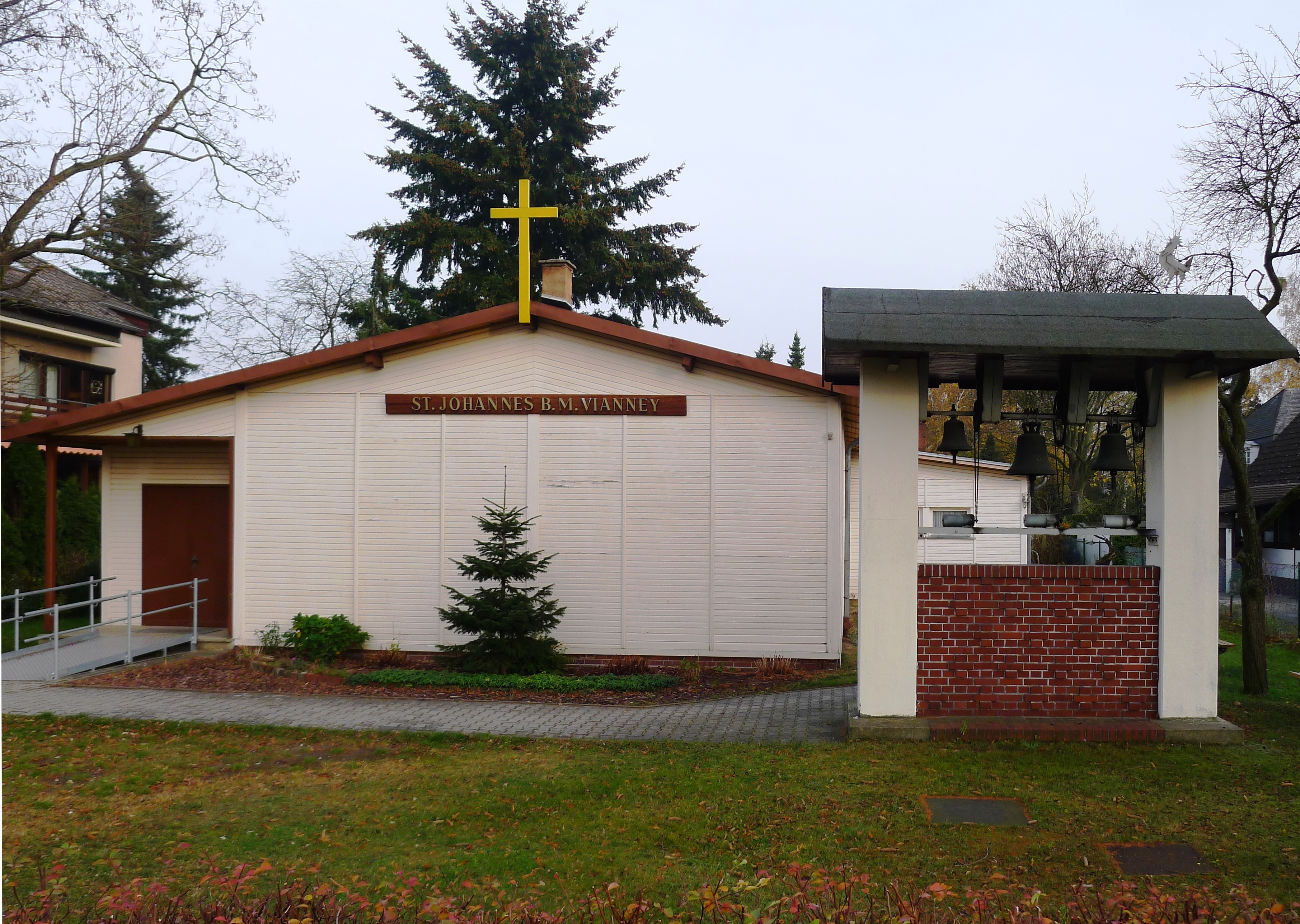 Blick von der Straße auf die Kirche